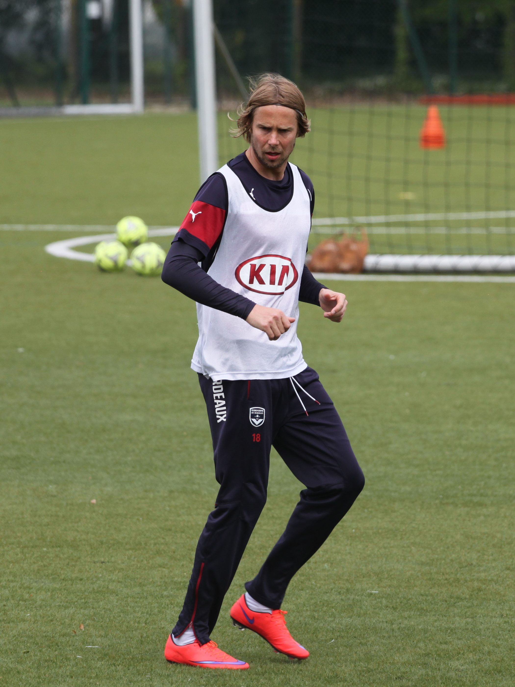 Plašil à l'entraînement.